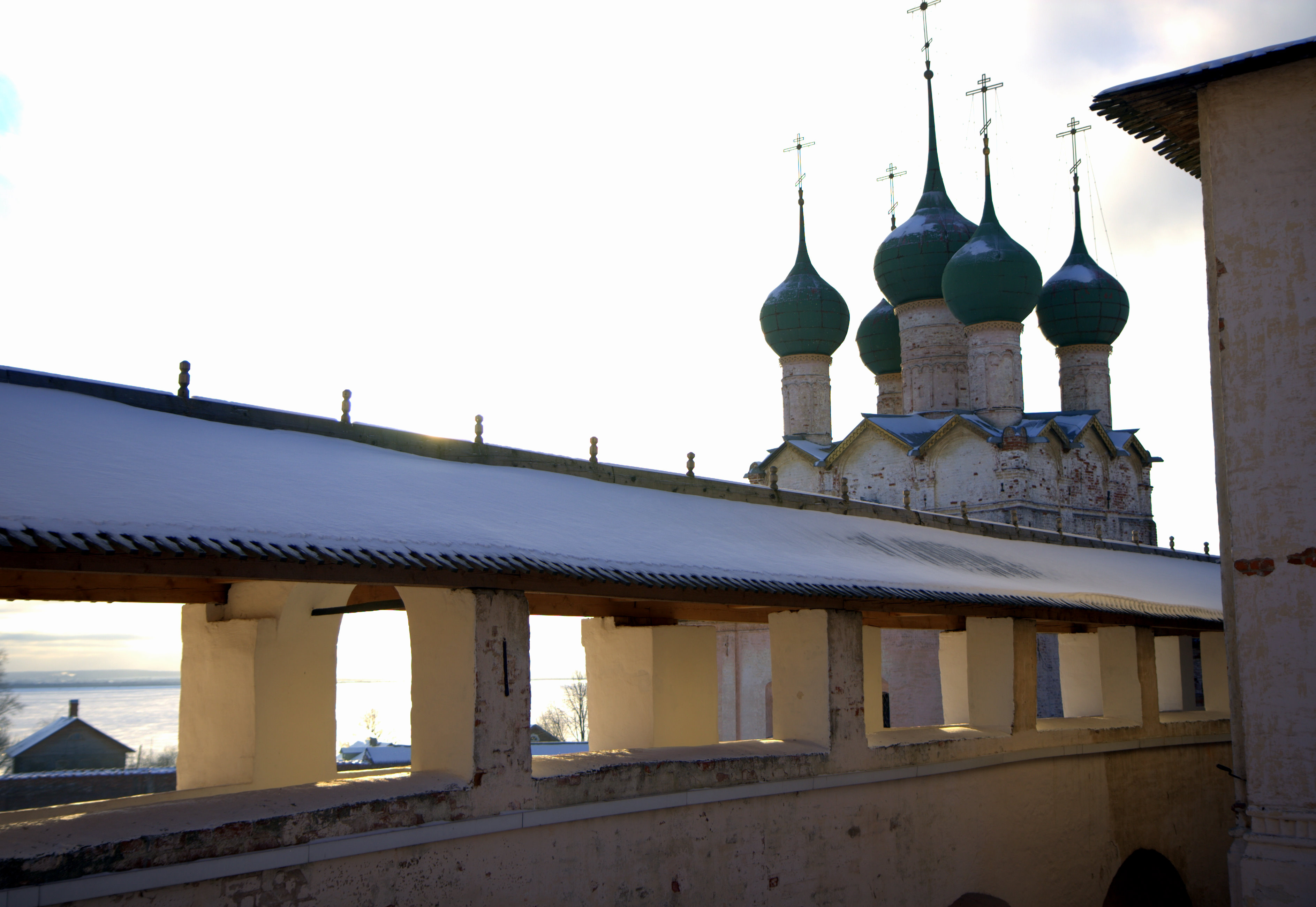 Крытые арочные переходы внутри Ростовского Кремля